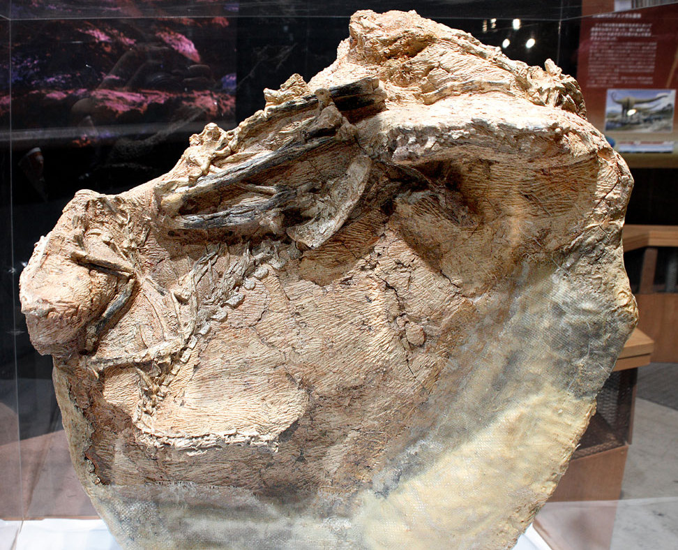 Guanlong - 01